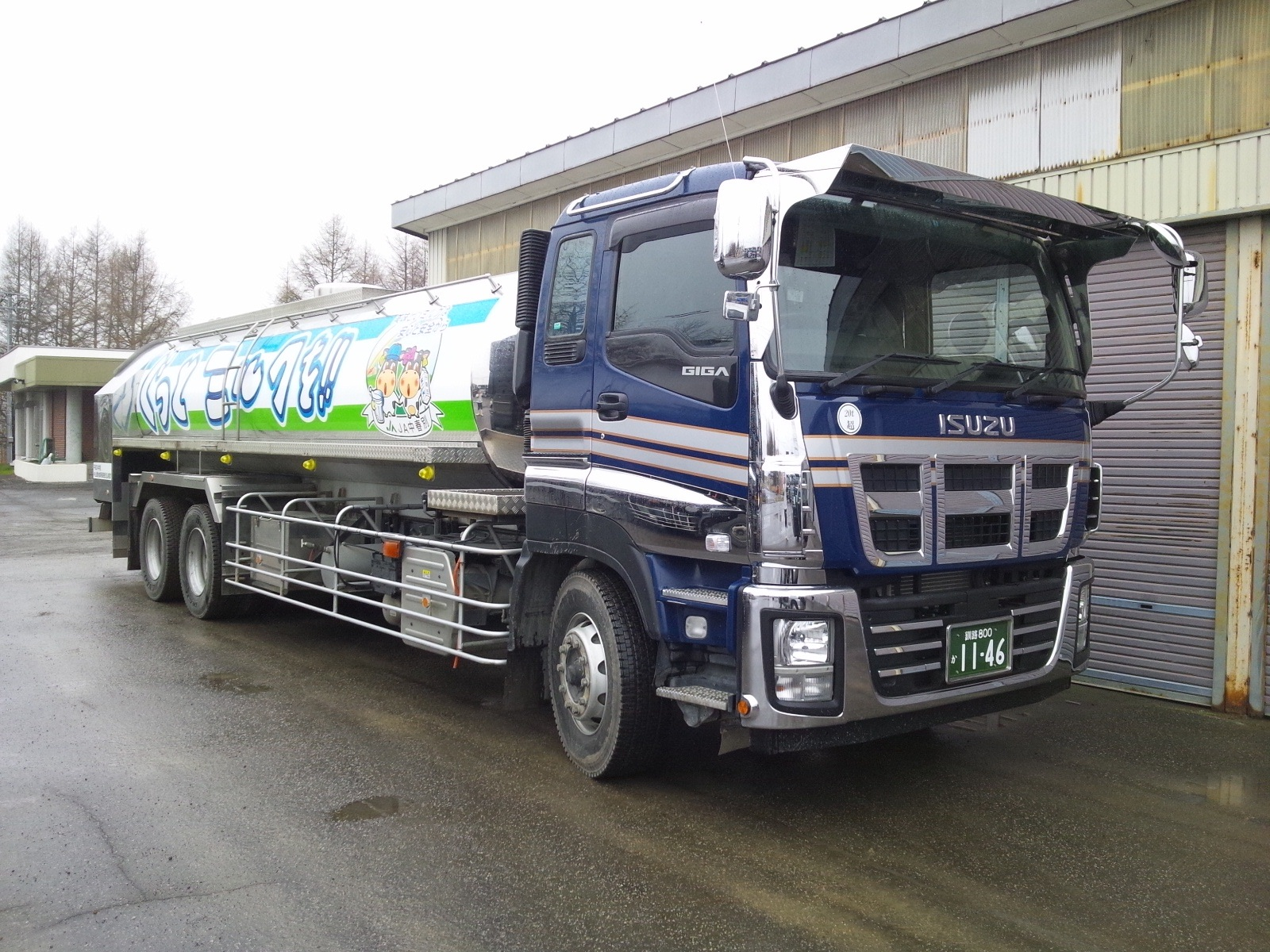 いすゞ ギガ 生乳用タンク車